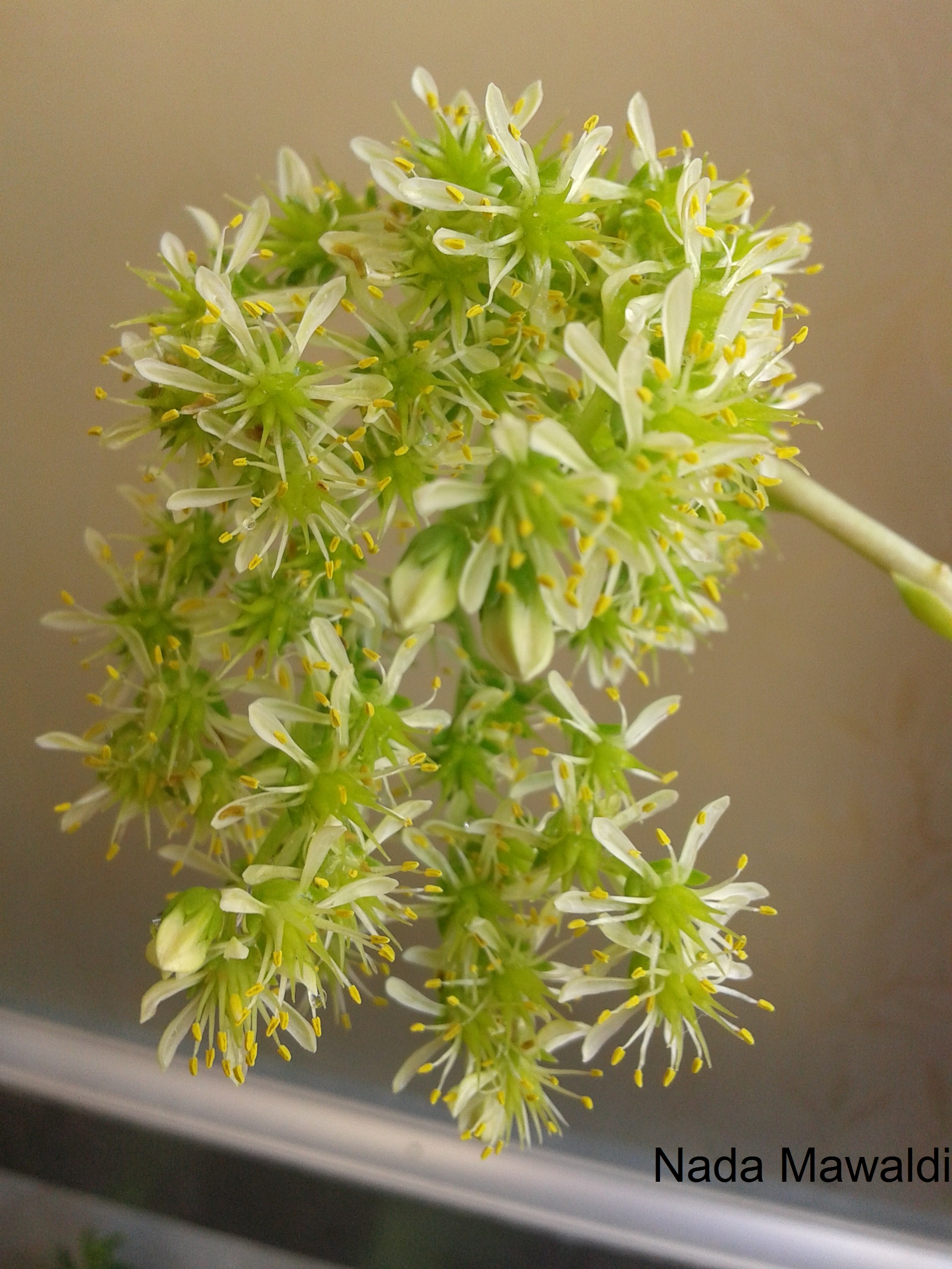 السيديوم الأزرق هو نبات مزهر، أورقه صبارية مخزنة للماء. يوجد أساساً في نصف الكرة الأرضية الشمالي ولكنها تمتد للنصف الجنوبي أيضاً.